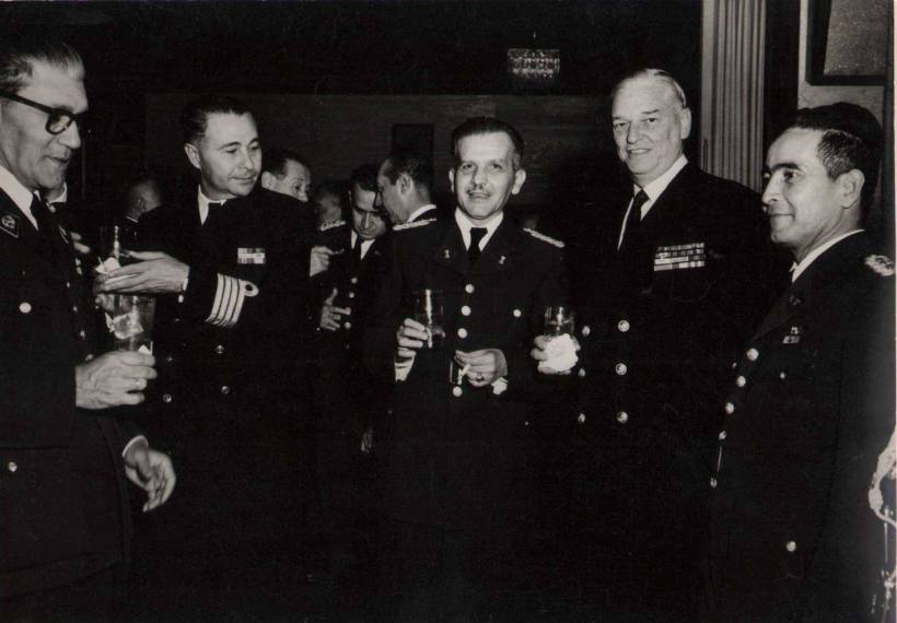 El cnel. Mazzei Carta con el CN Ghersy Gómez, extrema derecha Coronel Jesús María Castro León, el 30 de marzo de1955. Foto tomada de Ramón Alberto Rivero Blanco Historia Náutica de Venezuela.